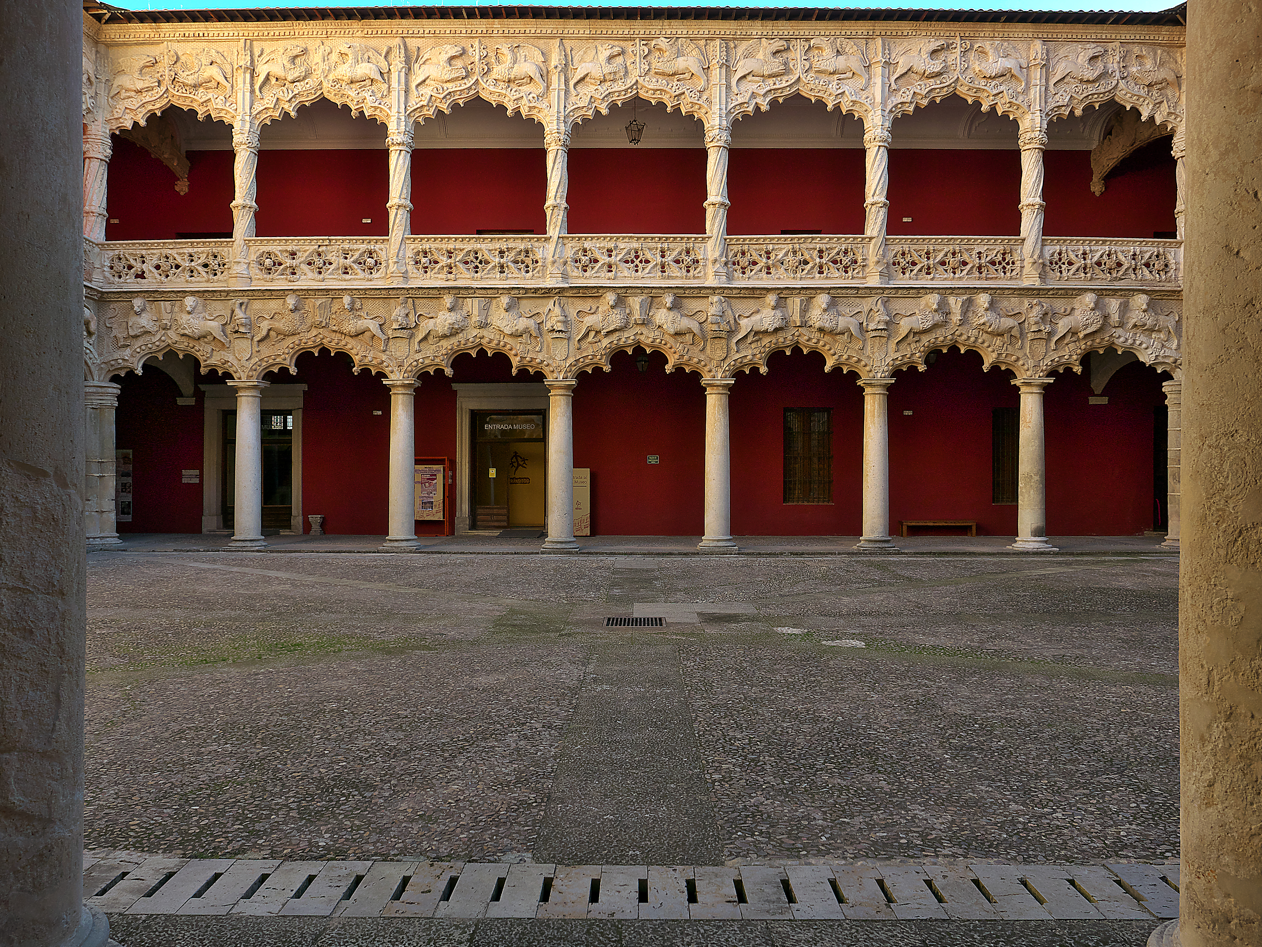 Palacio del Infantado. Cuarenta y ocho impresionantes leones, todos diferentes, y grifos, definen el patio de los duques del Infantado (1483).